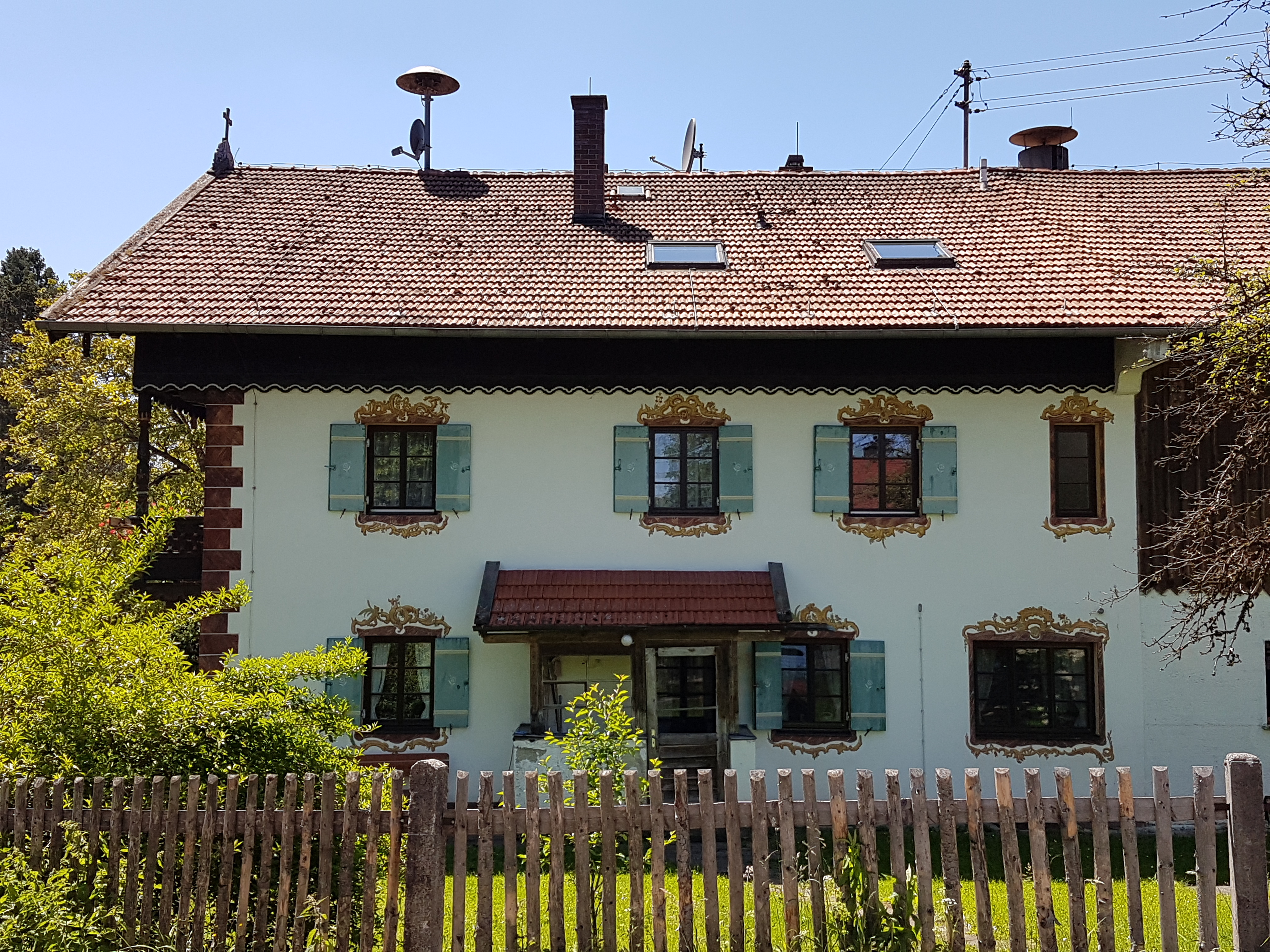 Zell, Wehnerbauer